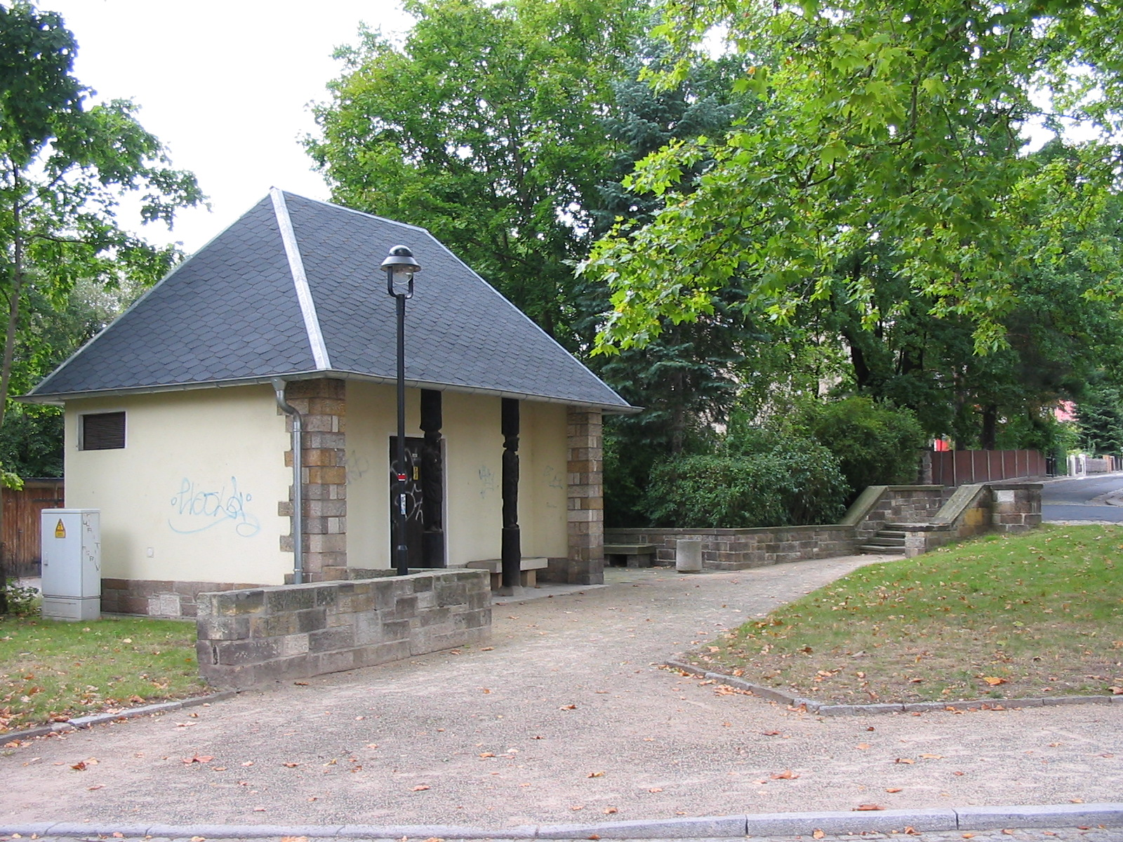 Radebeul Trafohaus Augustusweg/Nizzastraße Figuren